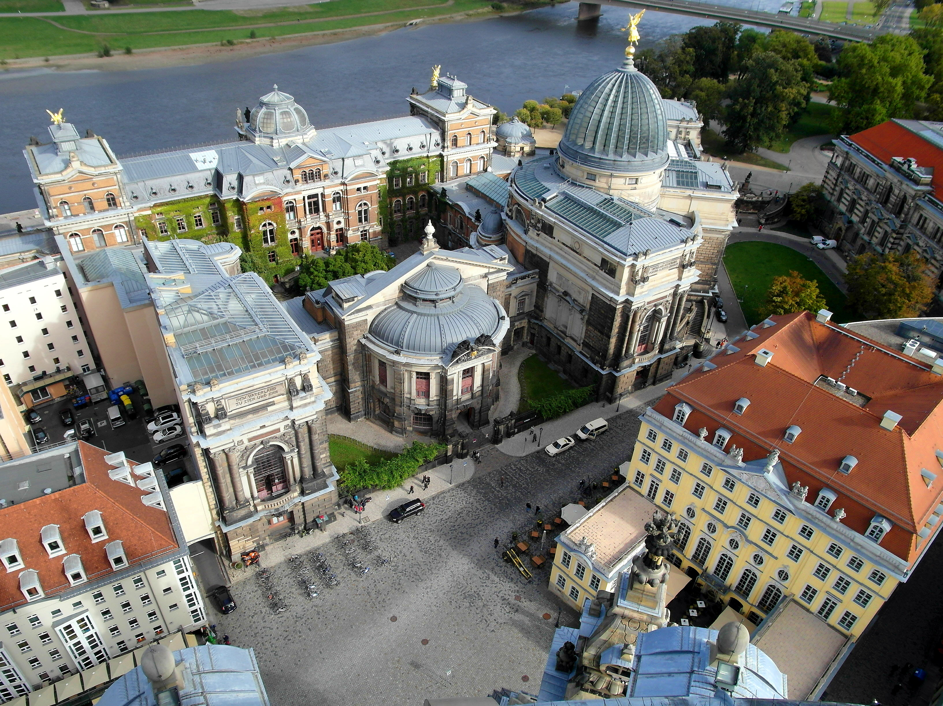 08.10.2012 01067 Dresden Neumarktareal: Blick von der Frauenkirche zur Kunstakademie und dem Coselpalais (rechts). [SAM1379]20121008110DR.JPG(c)Blobelt